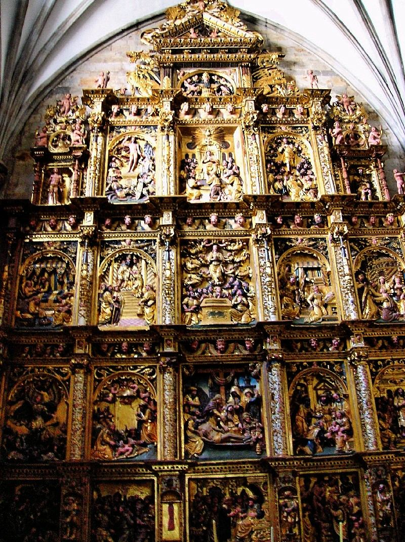 Retablo plateresco de la Capilla de la Piedad, Iglesia de San Miguel Arcángel, Oñate (Guipúzcoa)